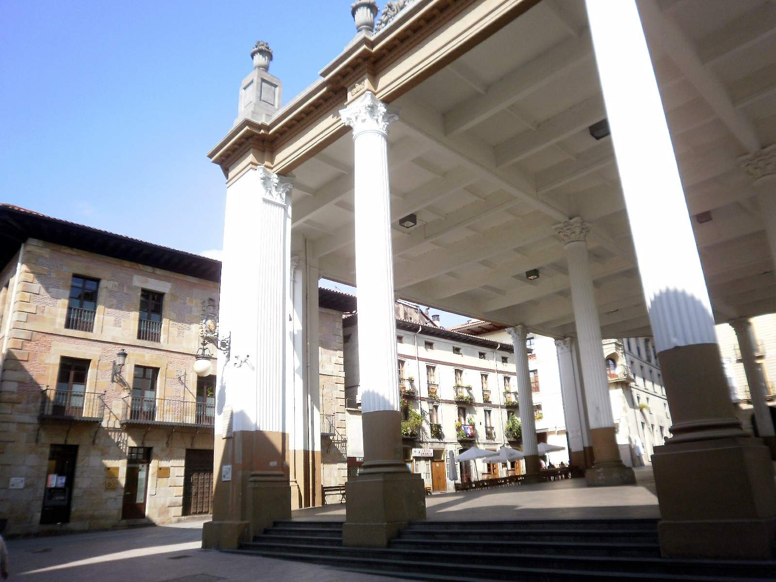 Plaza Nagusia, Ordizia